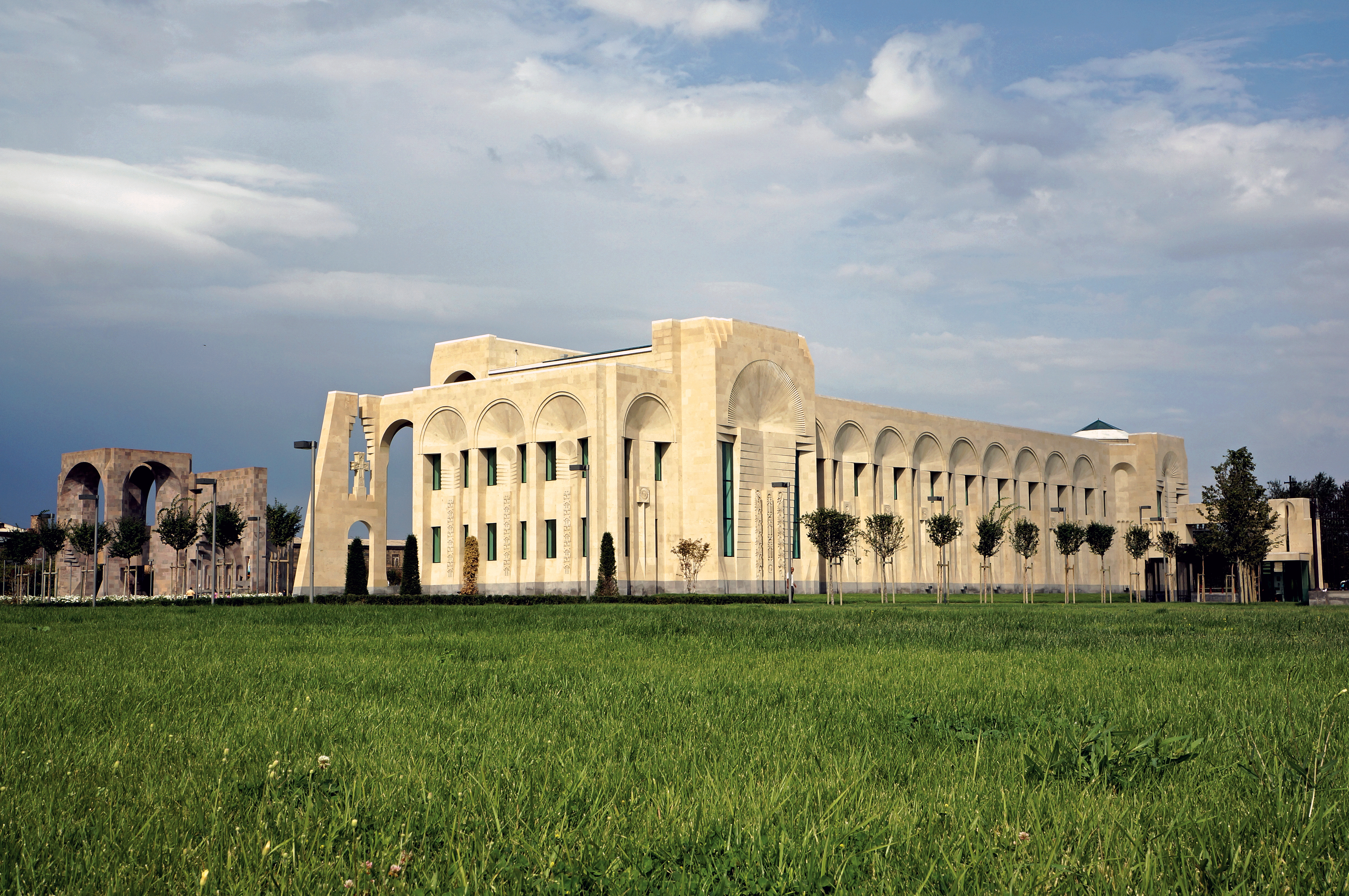 Վաչէ և Թամար Մանուկյան մատենադարան